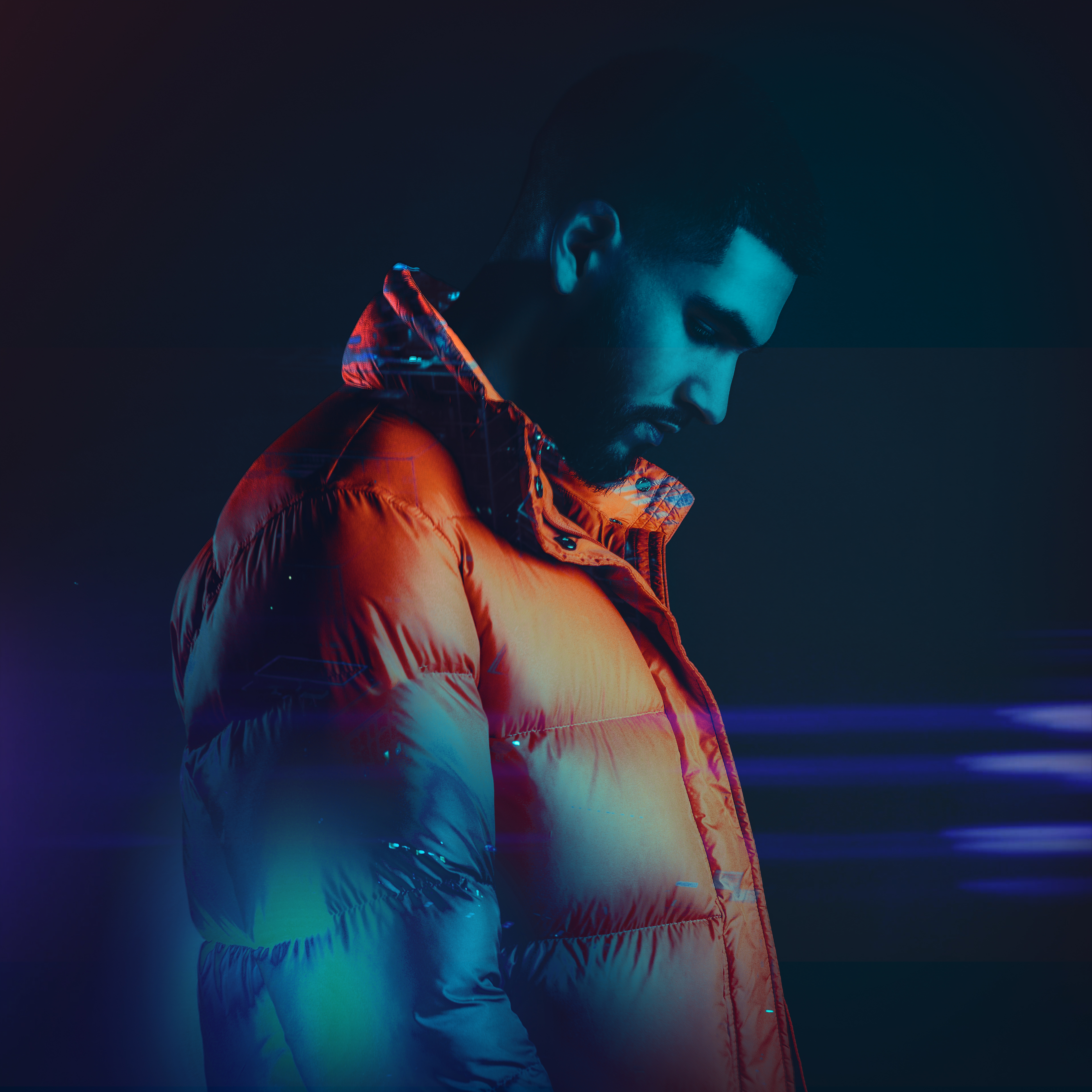 Mishlawi - Solitaire 2019